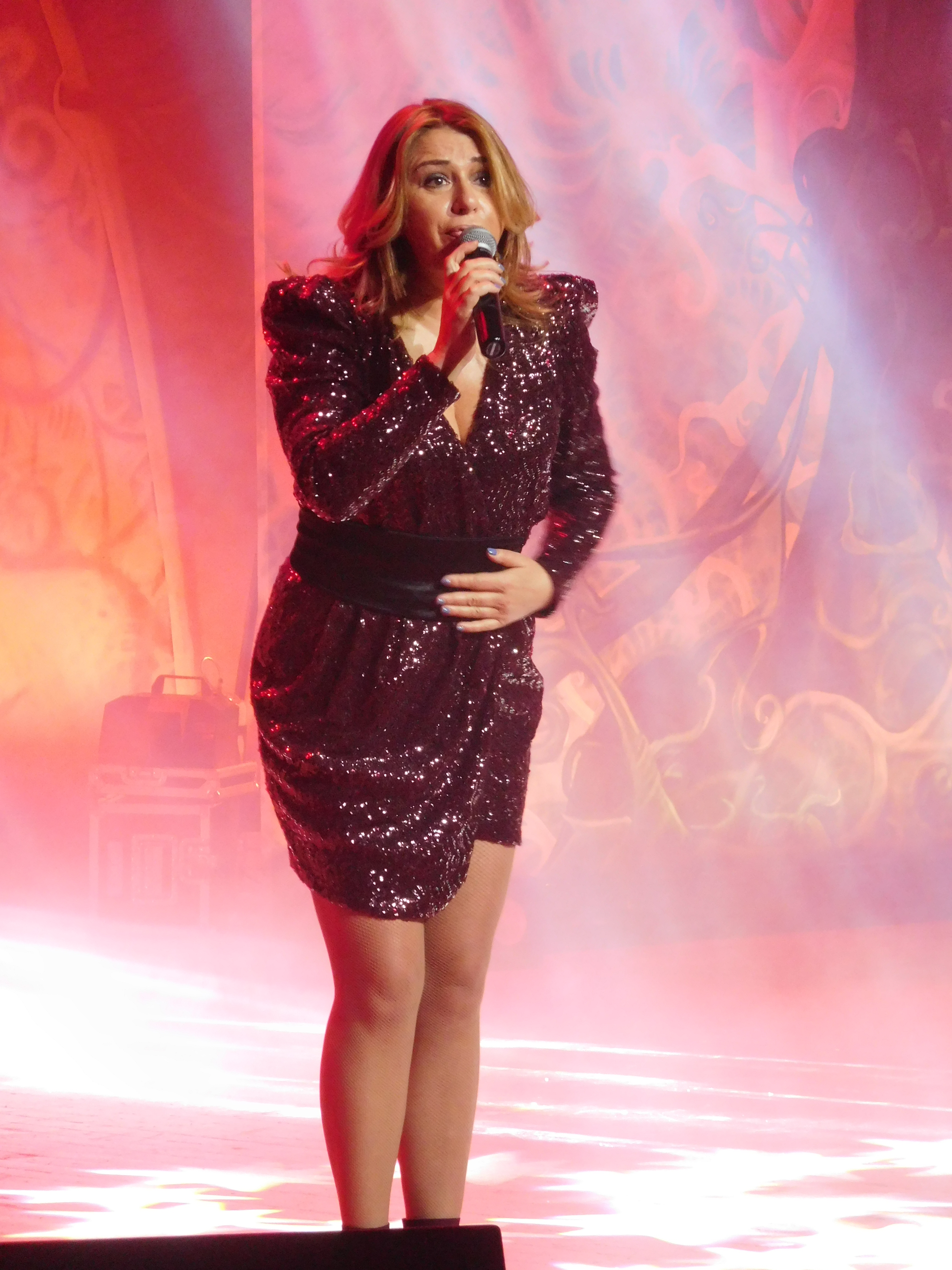 Алёна Апина на концерте 2018 года в ЦДКЖ